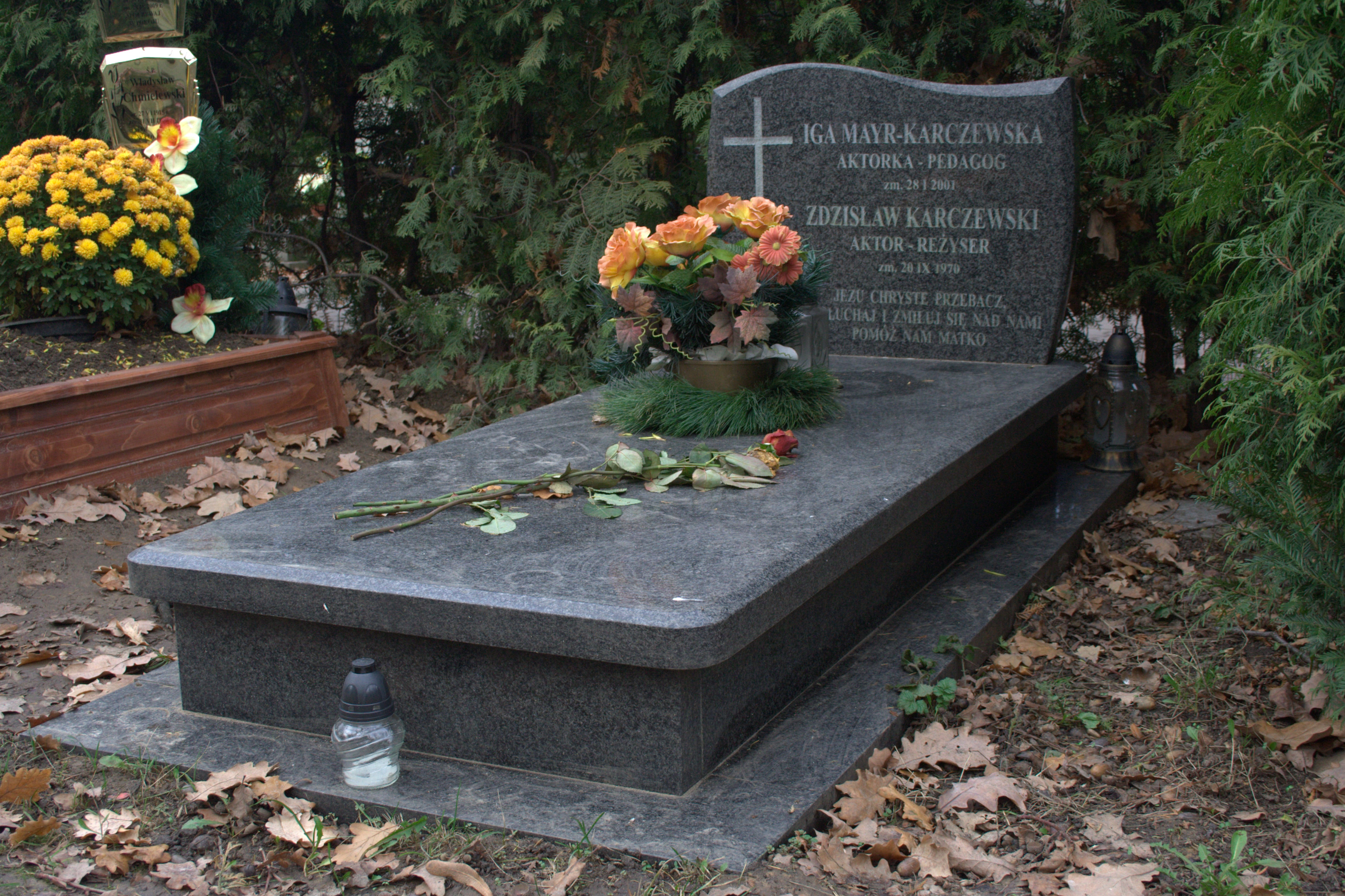 Grób Zdzisława Karczewskiego i jego żony Igi Mayr-Karczewskiej na Cmentarzu Osobowickim we Wrocławiu